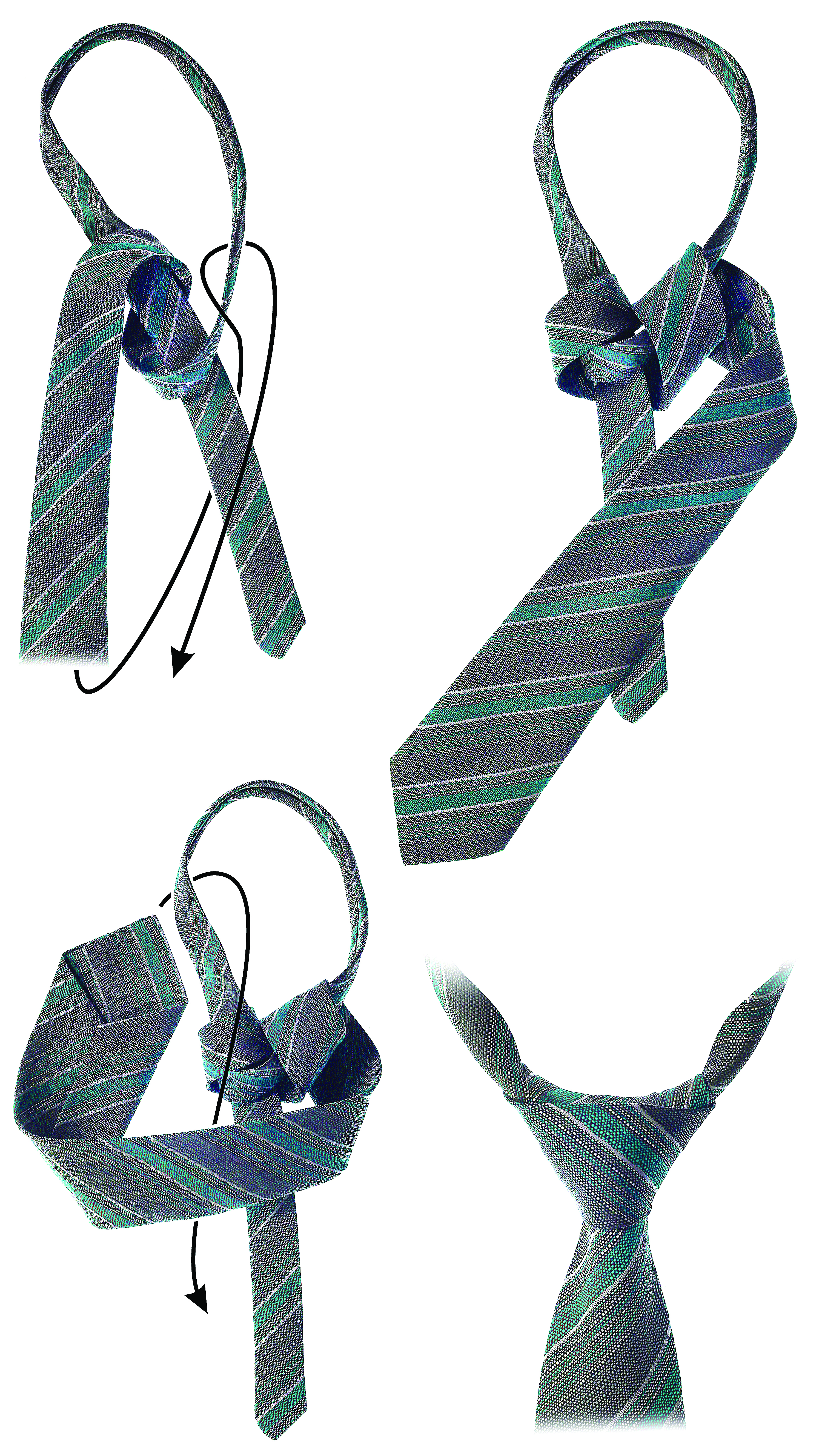 lipsusõlm